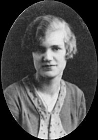 Sito: Articolo: "Pioniere. Ester Boserup e il ruolo delle donne in agricoltura" di Marcella Corsi - Licenza: 70-EU